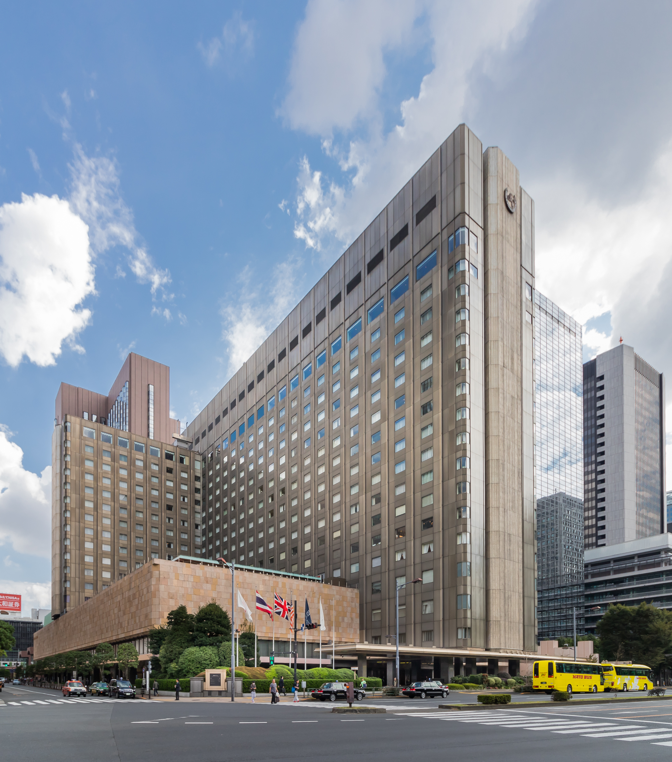 帝国ホテル東京